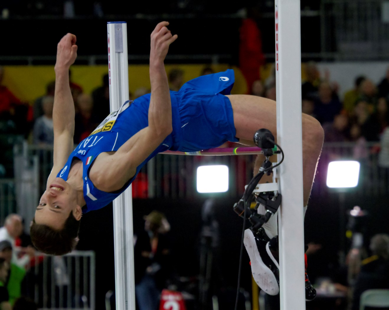 483 fasinotti